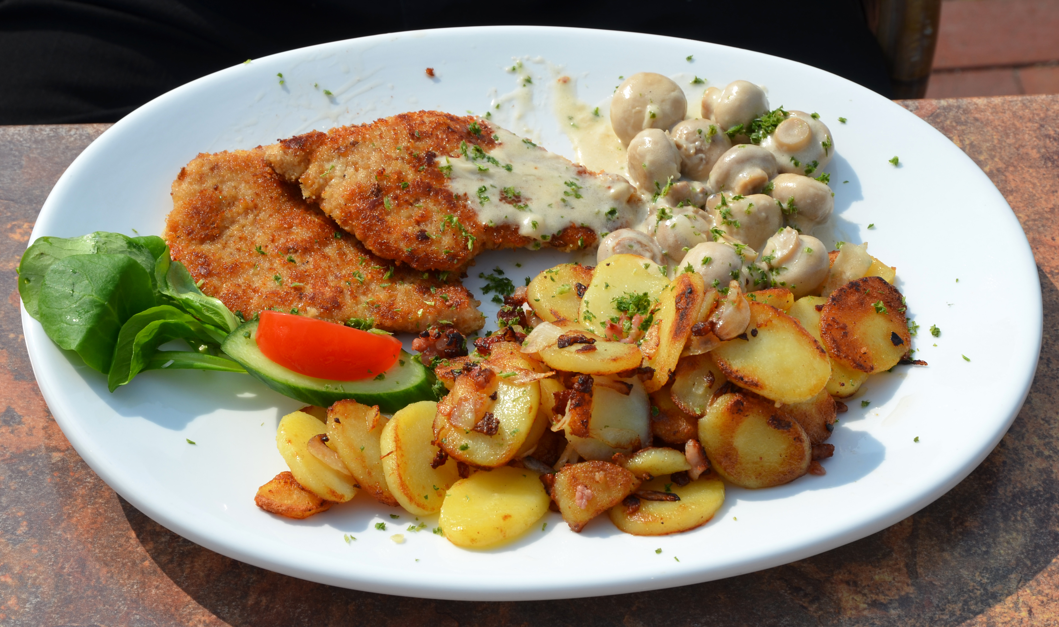 Kühlungsborn, feines Essen (2)